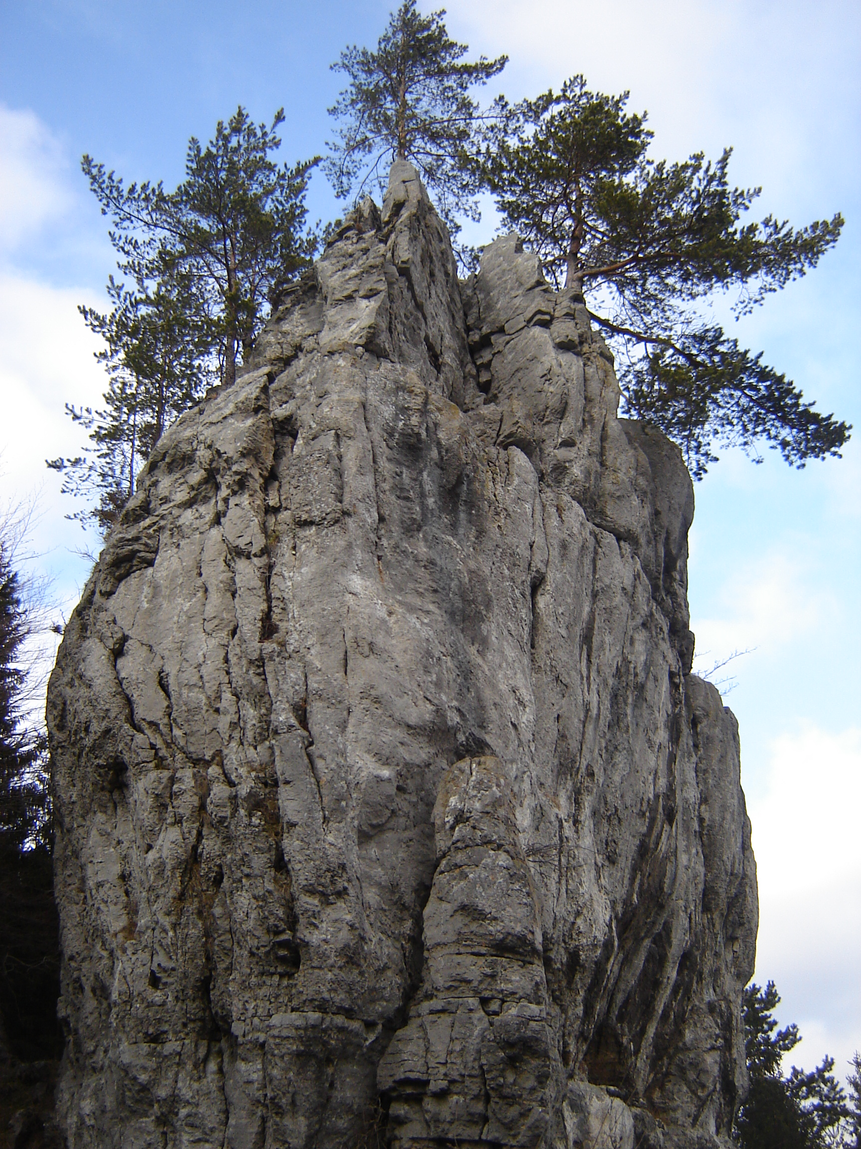 Krkavá skala